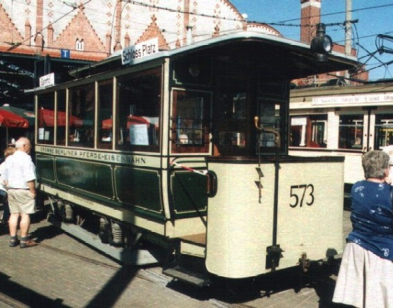 Berliner Pferdestrassenbahnwagen Typ Metropol von 1885